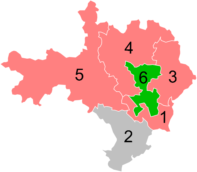 Résultats des élections législatives du Gard en 2012